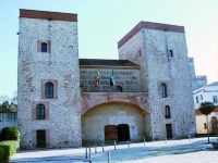 Museo de Bellas Artes